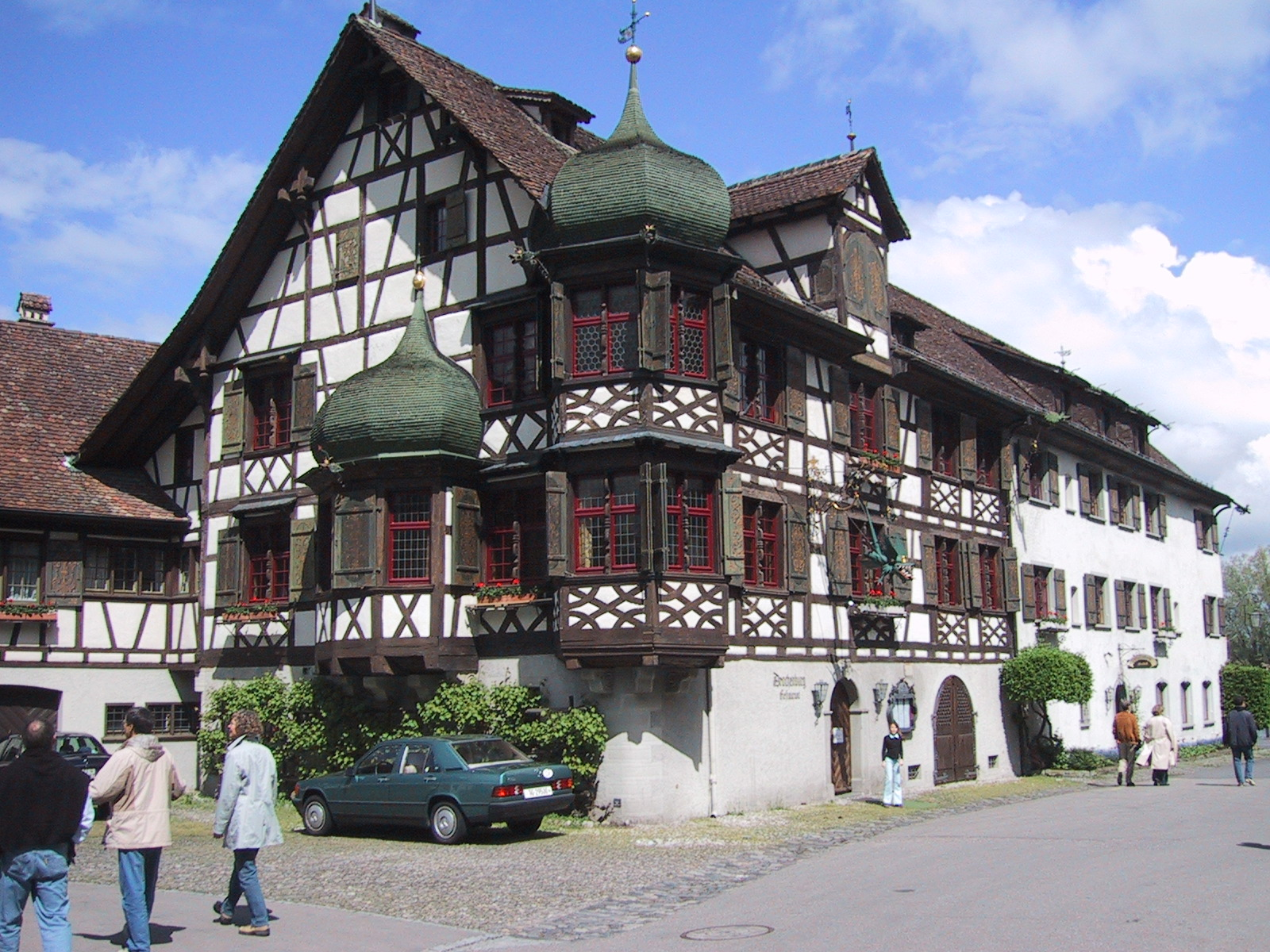 Gottlieben, Gasthaus Drachenburg.